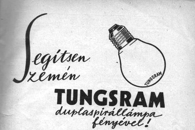 Tungsram lámpa reklám